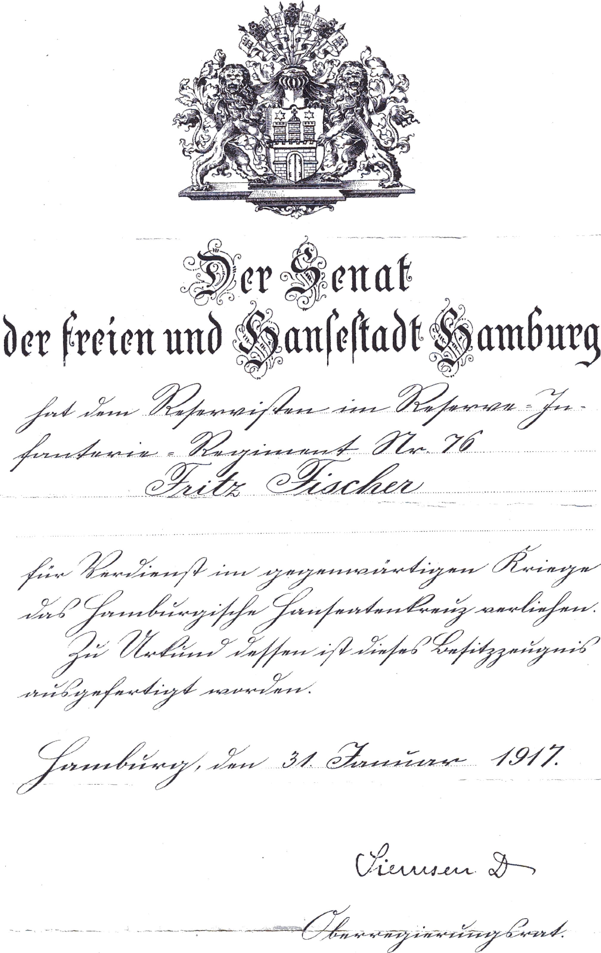 Verleihungsurkunde zum Hanseatenkreuz für Fritz Fischer, vom 31.01.1917, für Verdienste zu Einsätzen im 76.Infanterie-Regiment Hamburg (2.Hanseatisches) Nr.76 Die Verleihungsurkunde des Hanseatenordens wurde am 31.1.1917 in Hamburg ausgestellt. Der Träger Fritz Fischer, hiess eigentlich Friedrich Robert Fischer und wurde am 15.April 1987 (gemeint ist wahrscheinlich 1887) in Niederndodeleben, Bezirk Wolmirstedt bei Magdeburg, als Sohn eines Landwirtes geboren. Das ursprüngliche Regiment war das 26.Infanterie-Regiment "Fürst Leopold von Anhalt-Dessau" (1.Magdeburgisches) Nr.26 Im Laufe der Teilnahme an zahlreichen Gefechten und Schlachten wurde er am 22.11.1916 zum 76.Infanterie-Regiment Hamburg (2.Hanseatisches)Nr.76 versetzt unter Major Grützmacher und wurde mit dem Hanseatenkreuz für seine Verdienste ausgezeichnet.